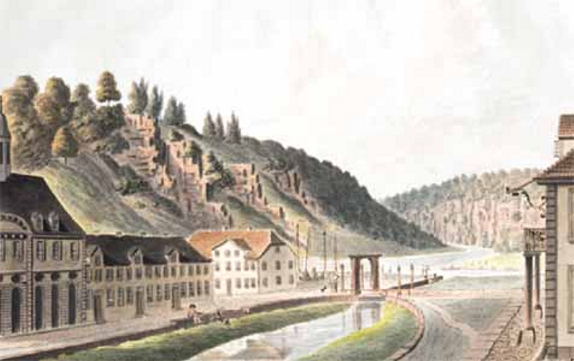 "Das Bassin zu Carlshafen" Quelle: Original-Aquarell in der Universitätsbibliothek Göttingen Zeichner: Christian Andreas Besemann Datum: 1792 Sonstiges: aus